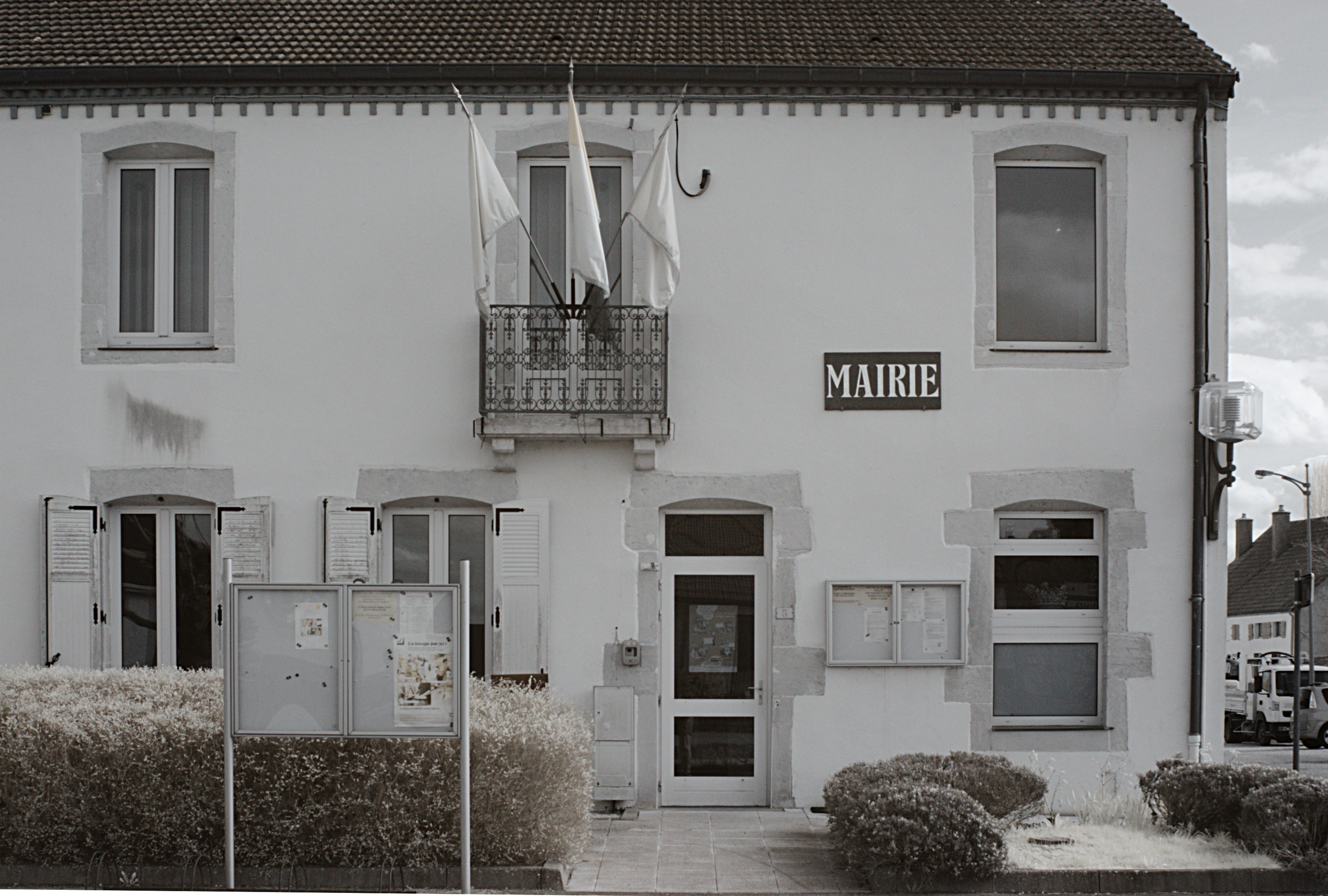 Mairie, Laperrière-sur-Saône (Côte d'Or, Bourgogne, France) photographié avec un filtre infrarouge 720 nm.